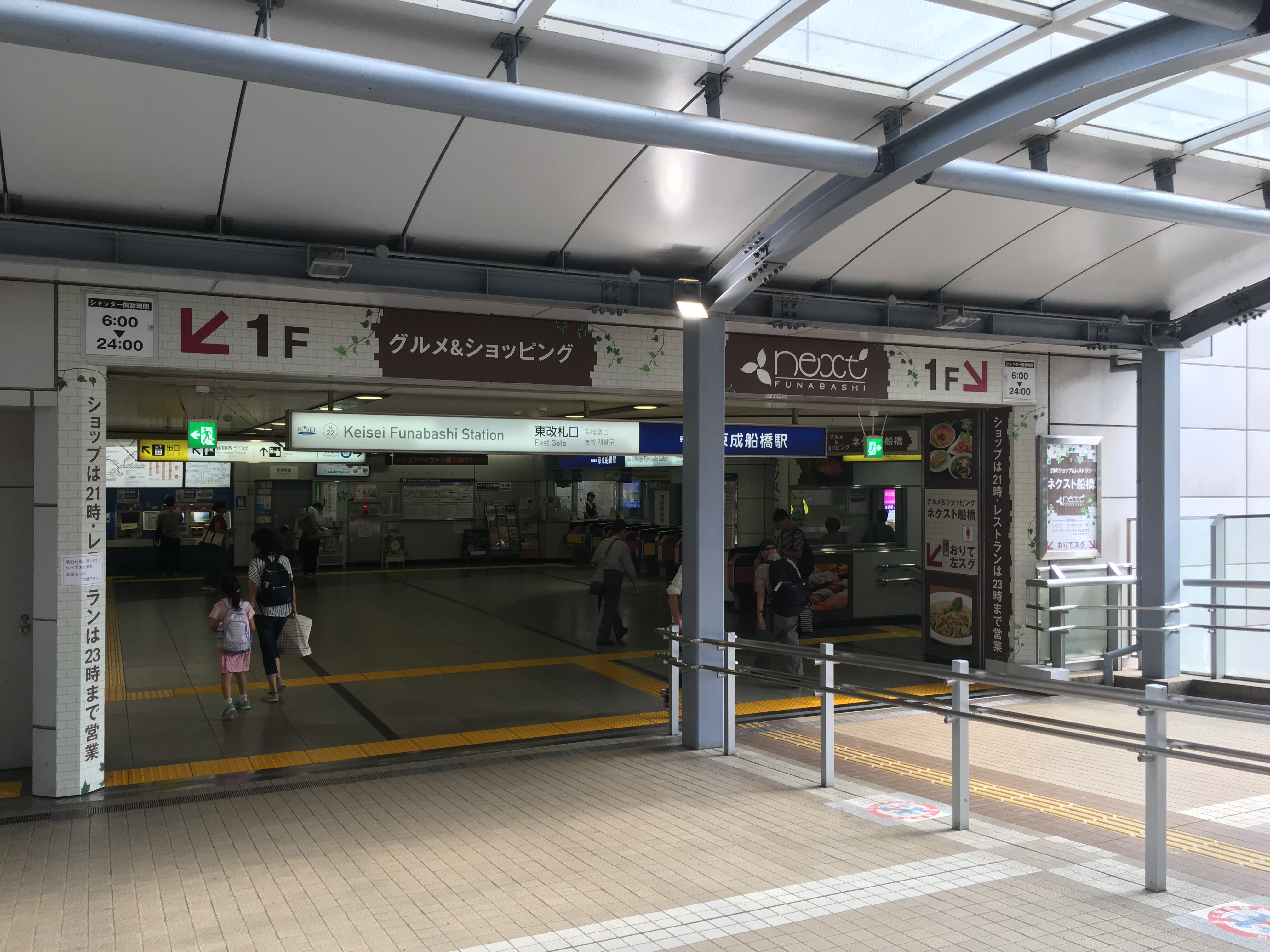 京成船橋駅 (Keisei Funabashi Station)